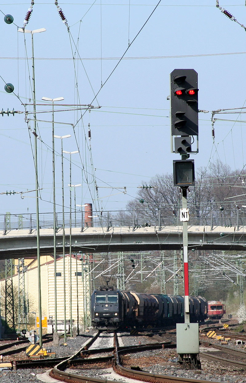 Ausfahrsignal zeigt 'Halt'